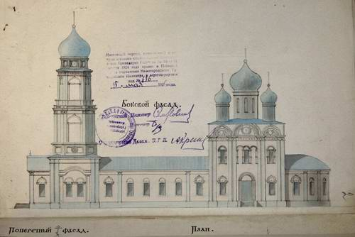 Вознесенский собор в городе Семенове, план.